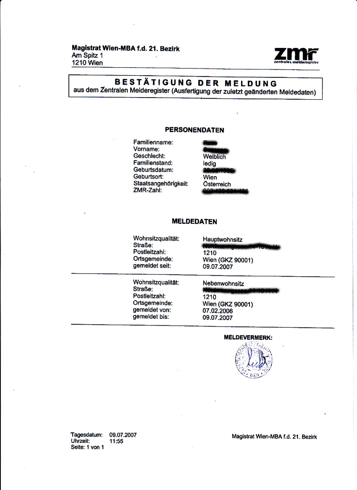 Bestätigung der Meldung („Meldezettel“) des Magistrates der Stadt Wien vom 9. Juli 2007